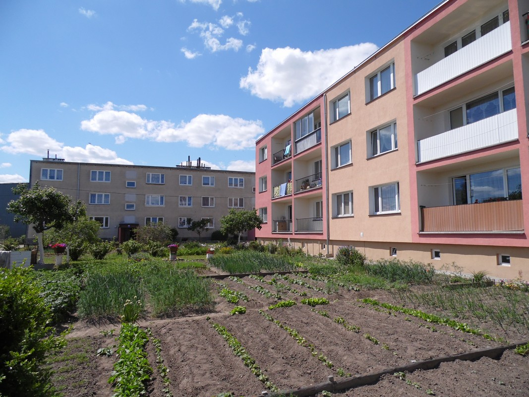 BLOKI MIESZKALNE.